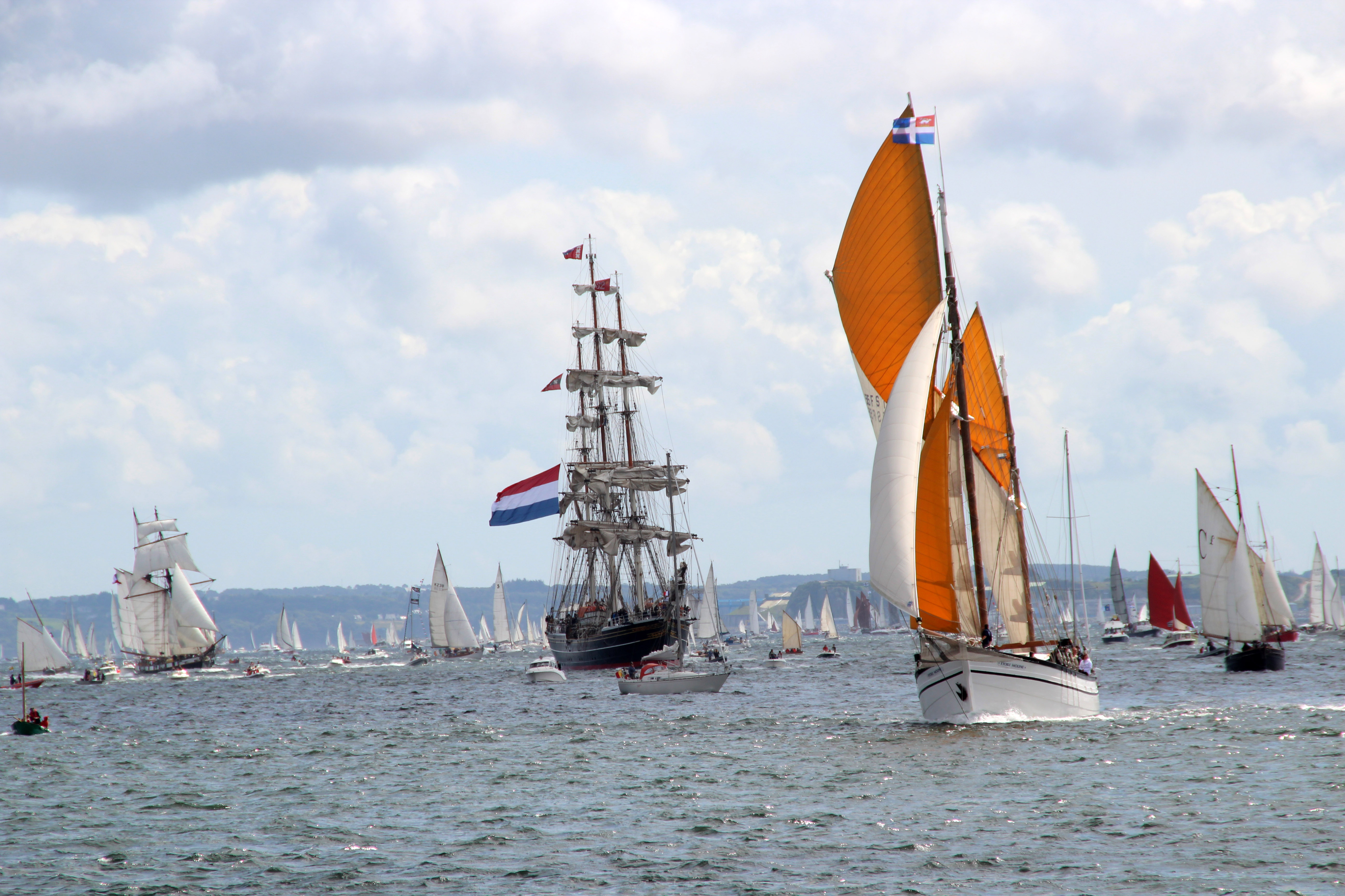 Tonnerres de Brest 2012-Etoile Molène entrant en rade abri par la passe sud